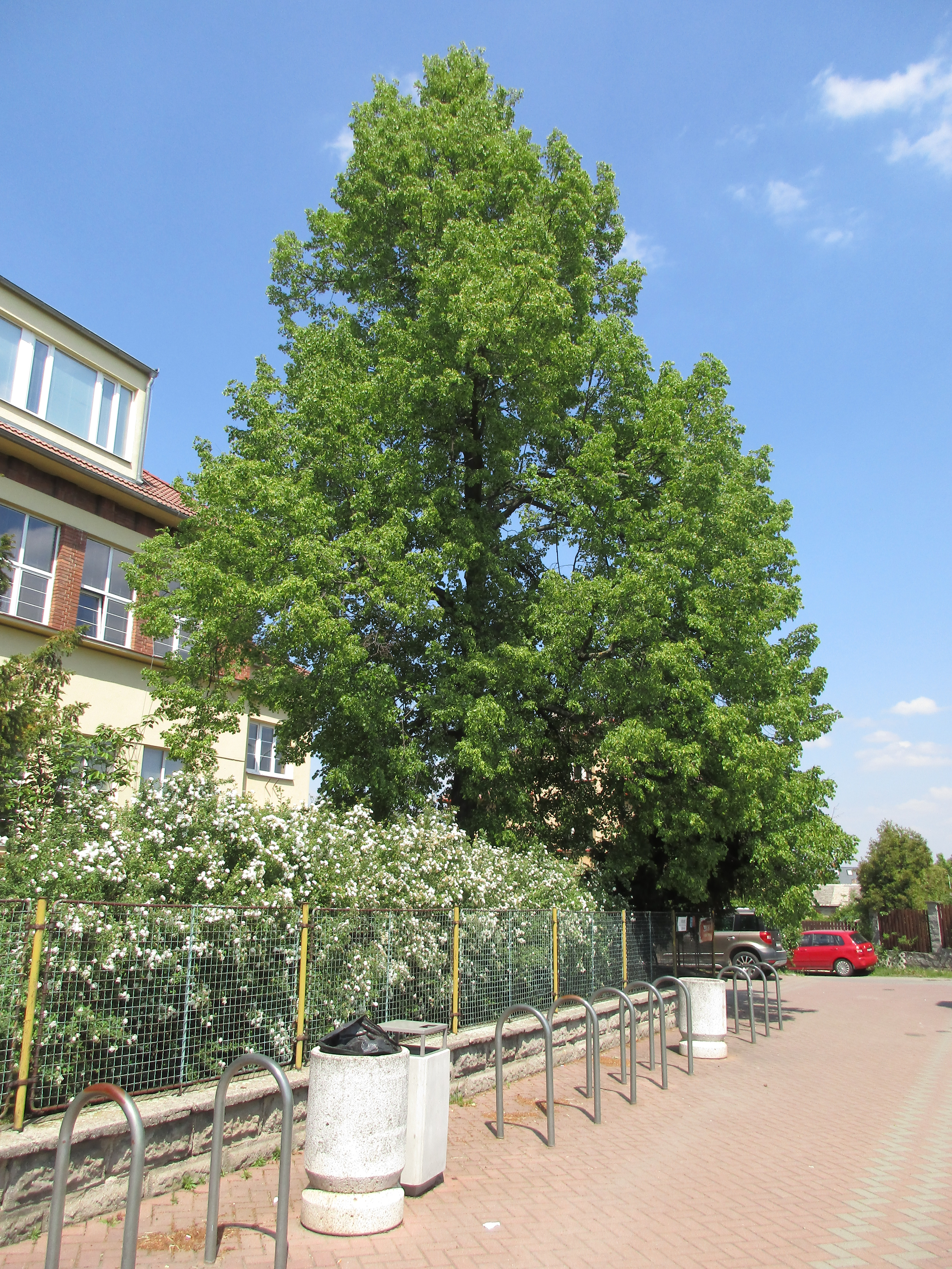 Lípa malolistá (Tilia cordata). Praha 9 - Vinoř, ulice Prachovická. Vysazena 28. října 1968 na památku 50. výročí vzniku Československé republiky. Významný strom, evidenční číslo MHMP: 43, v databázi od roku 2014.